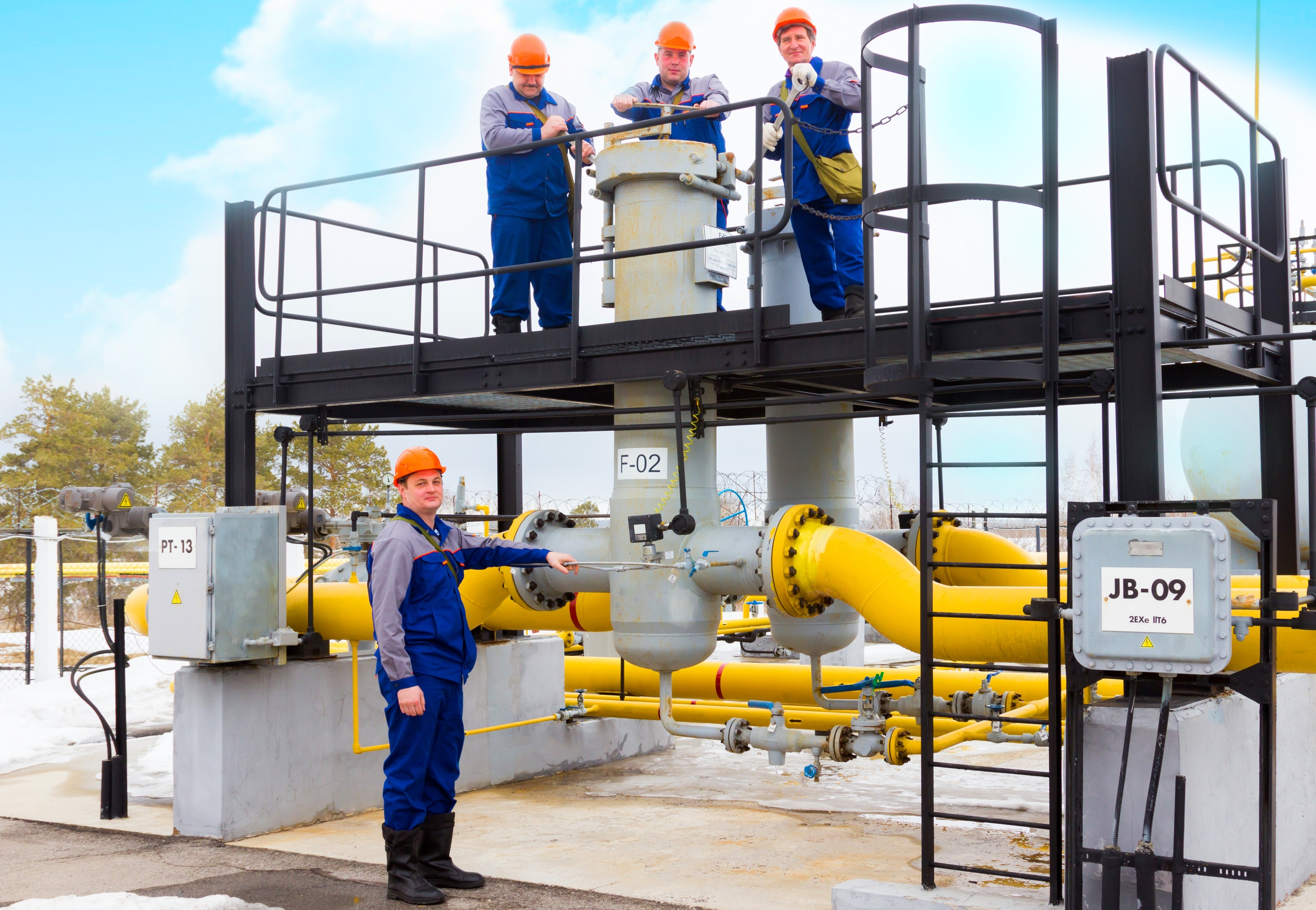 Коллектив ПАО "Трансаммиак"